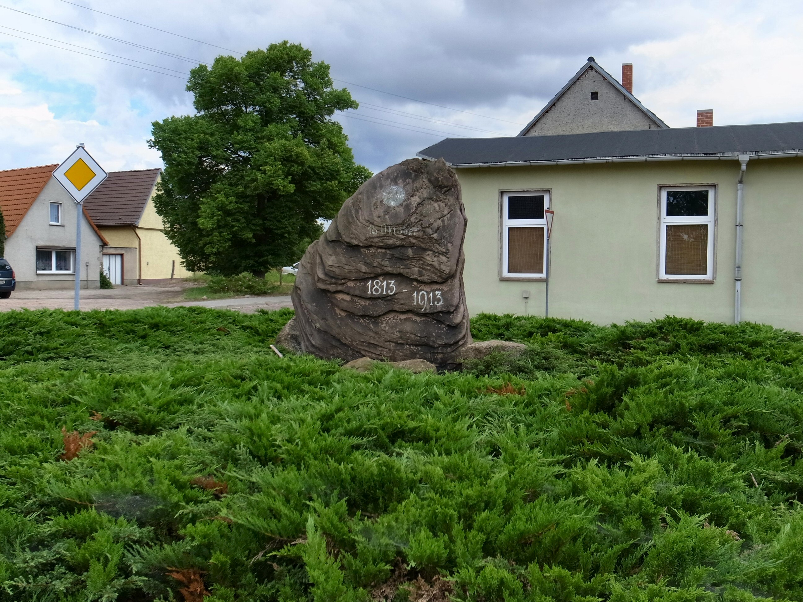 Südliches Anhalt, Ortsteil Libehna, Denkmal 18. Oktober 1813-1913 (Baudenkmal im Denkmalverzeichniss Sachsen-Anhalt, Erfassungsnummer: 094 70621 000 000 000 000 [1])